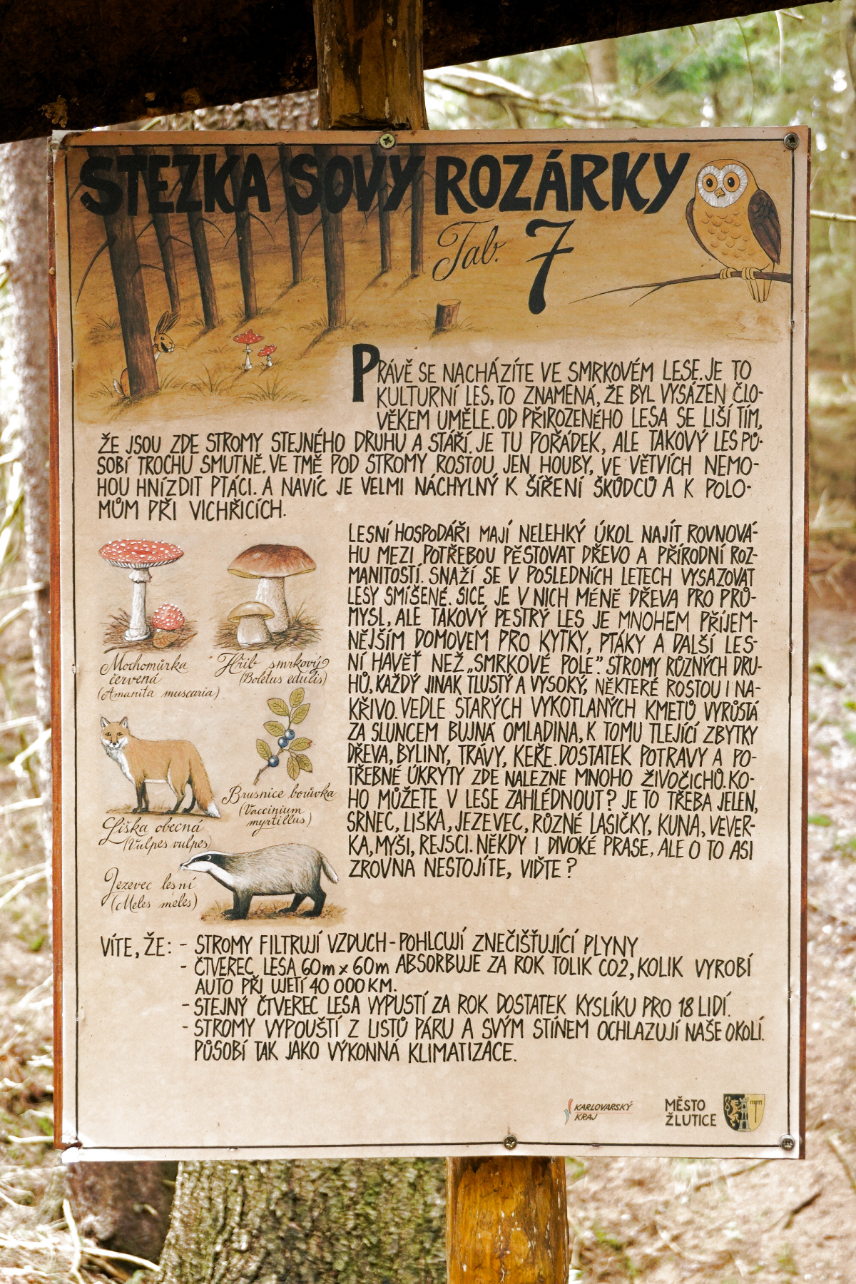 Informační panel na naučné stezce